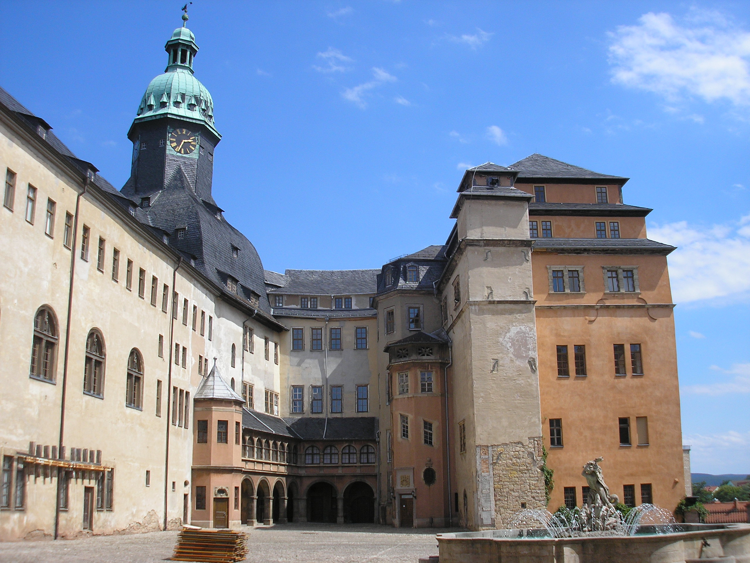 Der Innenhof des Schlosses in Sondershausen (Thüringen).